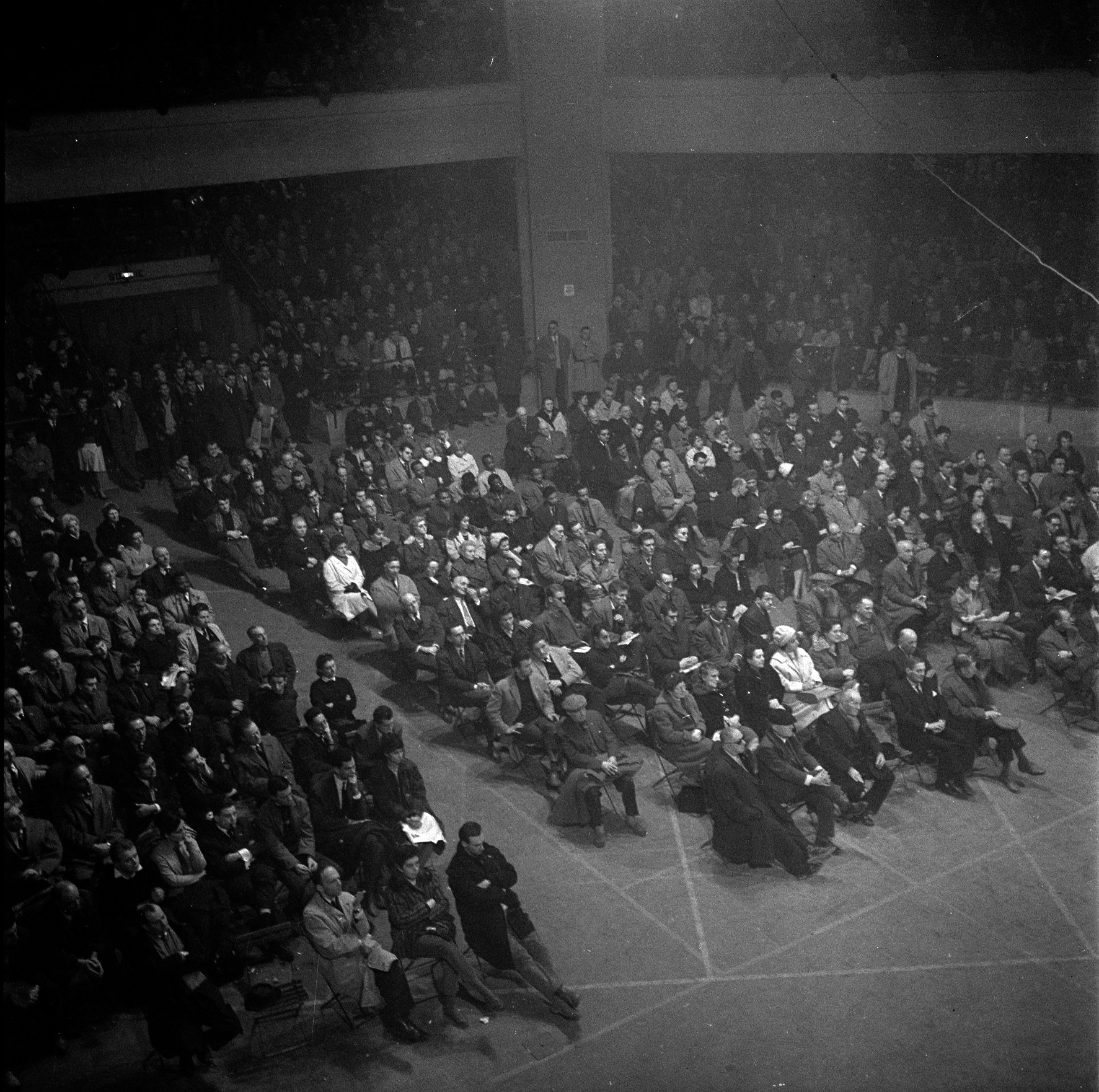 Halle aux Grains, place Dominique-Martin-Dupuy. 20 janvier 1962. Vue d'ensemble du public lors d'un meeting du Parti Socialiste Unifié (PSU) contre la guerre en Algérie en présence de Pierre Mendès France et de Raymond Badiou.